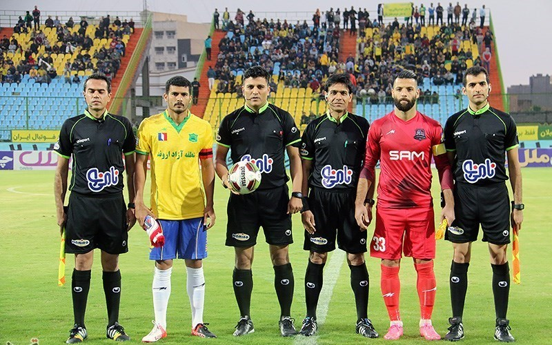 مازِرونی: نساجی و آبادان ِصنعت‌نفت فوتوال کا. فصل 97-98 شنه.